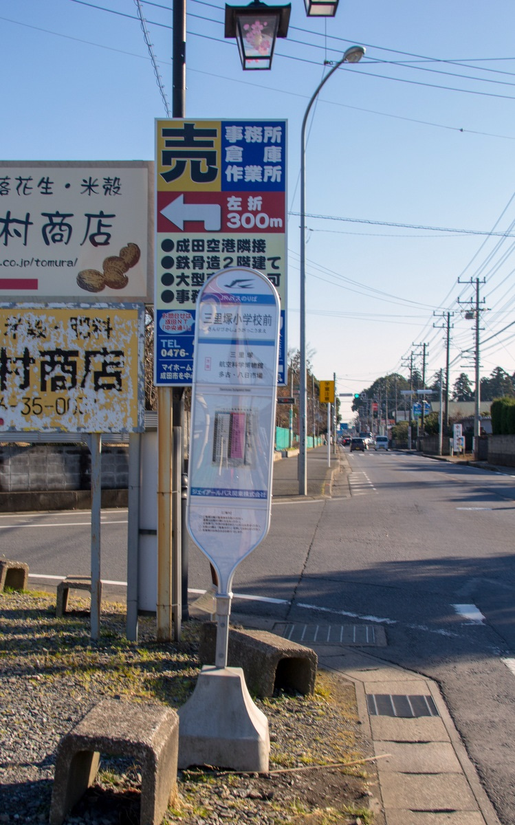 千葉県道62号成田松尾線 三里塚小学校前バス停